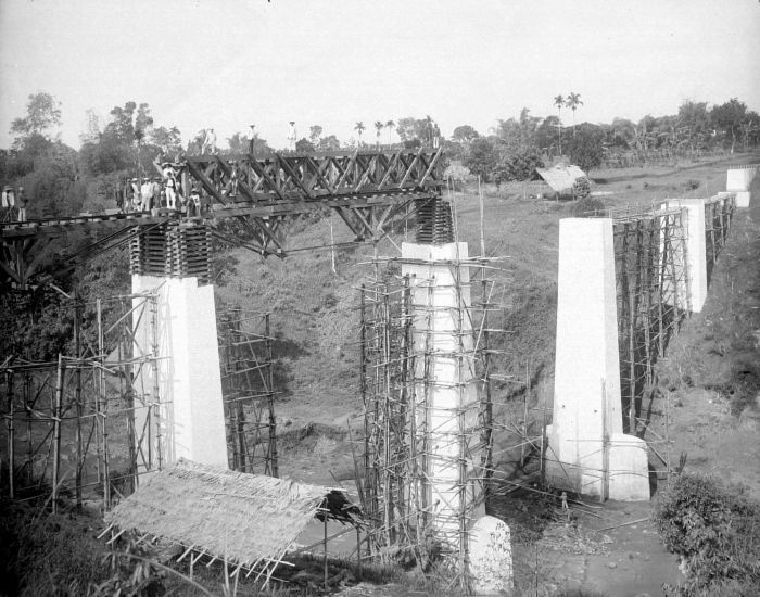 Negatif. Pembangunan jembatan rel di daerah antara Jember dan Banyuwangi